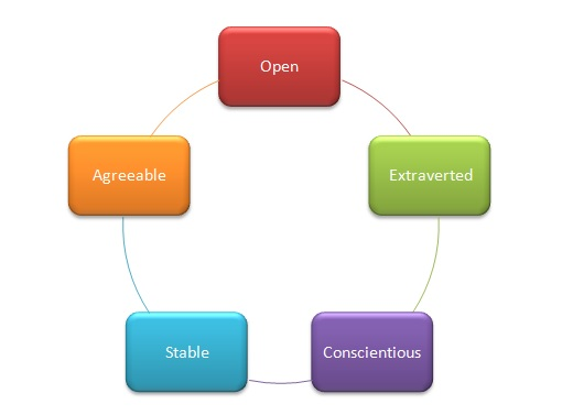 Ce graphique représente le modèle du big five et ces différents traits de personnalité (Costa & McCrae, 1992).